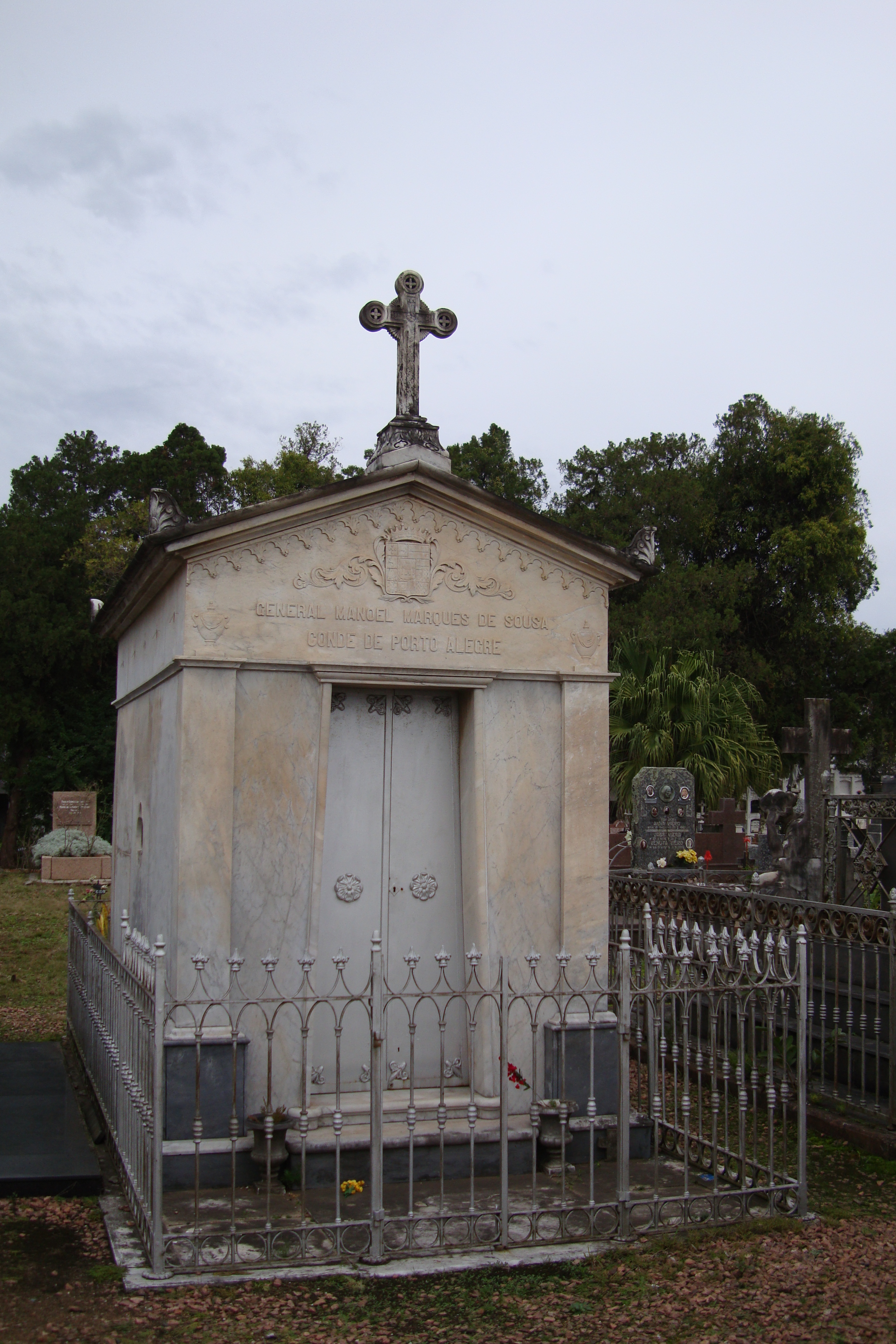 Túmulo de Manuel Marques de Sousa, o conde de Porto Alegre, no cemitério da Santa Casa de Misericórdia, em Porto Alegre, Rio Grande do Sul, Brasil